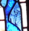 Berndmark Heukemes. Das Kirchenfenster links vom Aufgang zur Orgelempore von St. Gallus Ladenburg zeigt Motive aus der römischen Stadtgeschichte. Als kleines Detail hat der Künstler auch den Archäologen und Ladenburger Ehrenbürger Berndmark Heukemes mit Tabakpfeife hier verewigt.